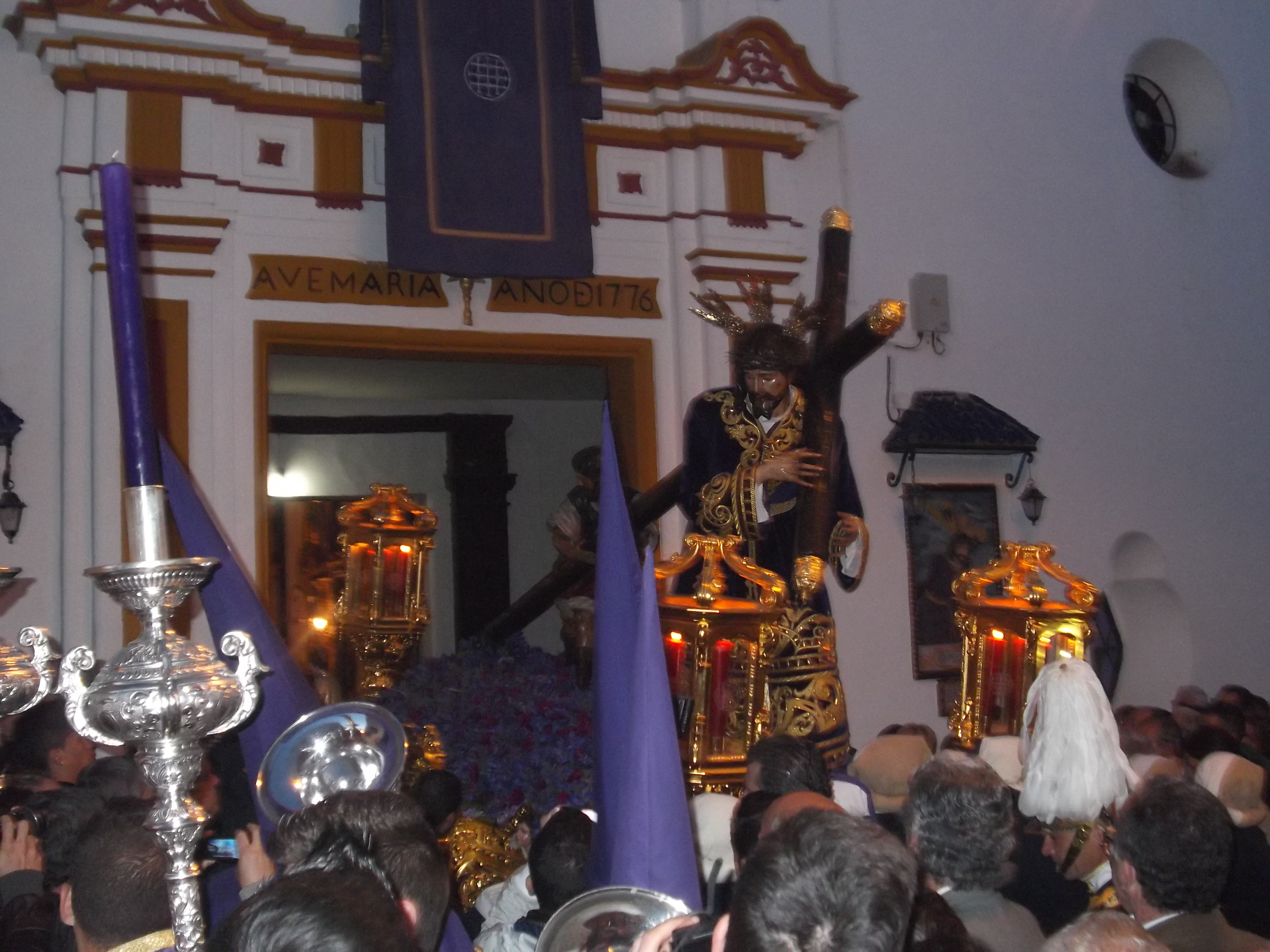 Salida del paso de Cristo el Viernes Santo a las 7:30 de la mañana.